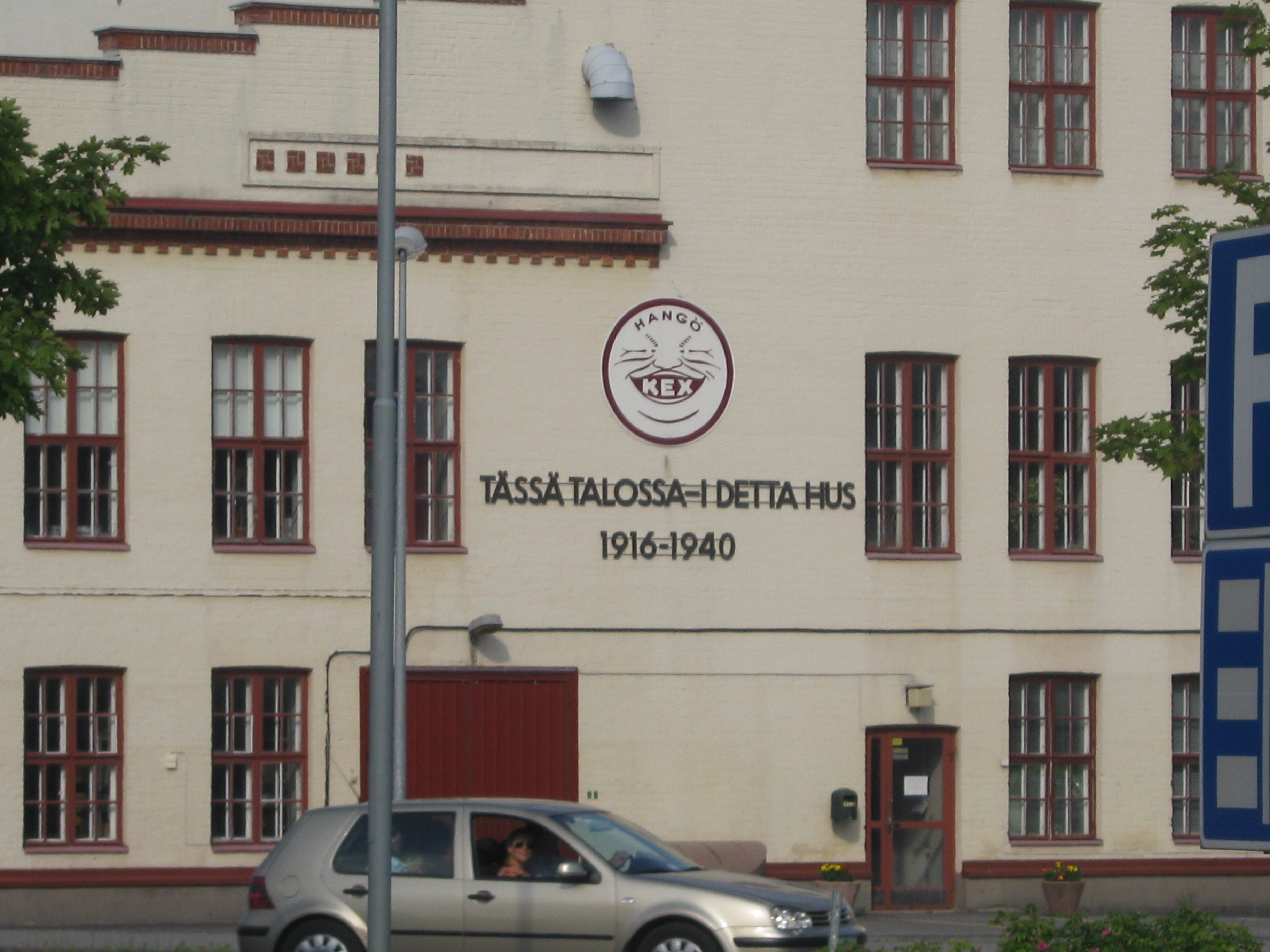 Hangossa vuosina 1916-1940 toimineen keksitehtaan kiinteistö